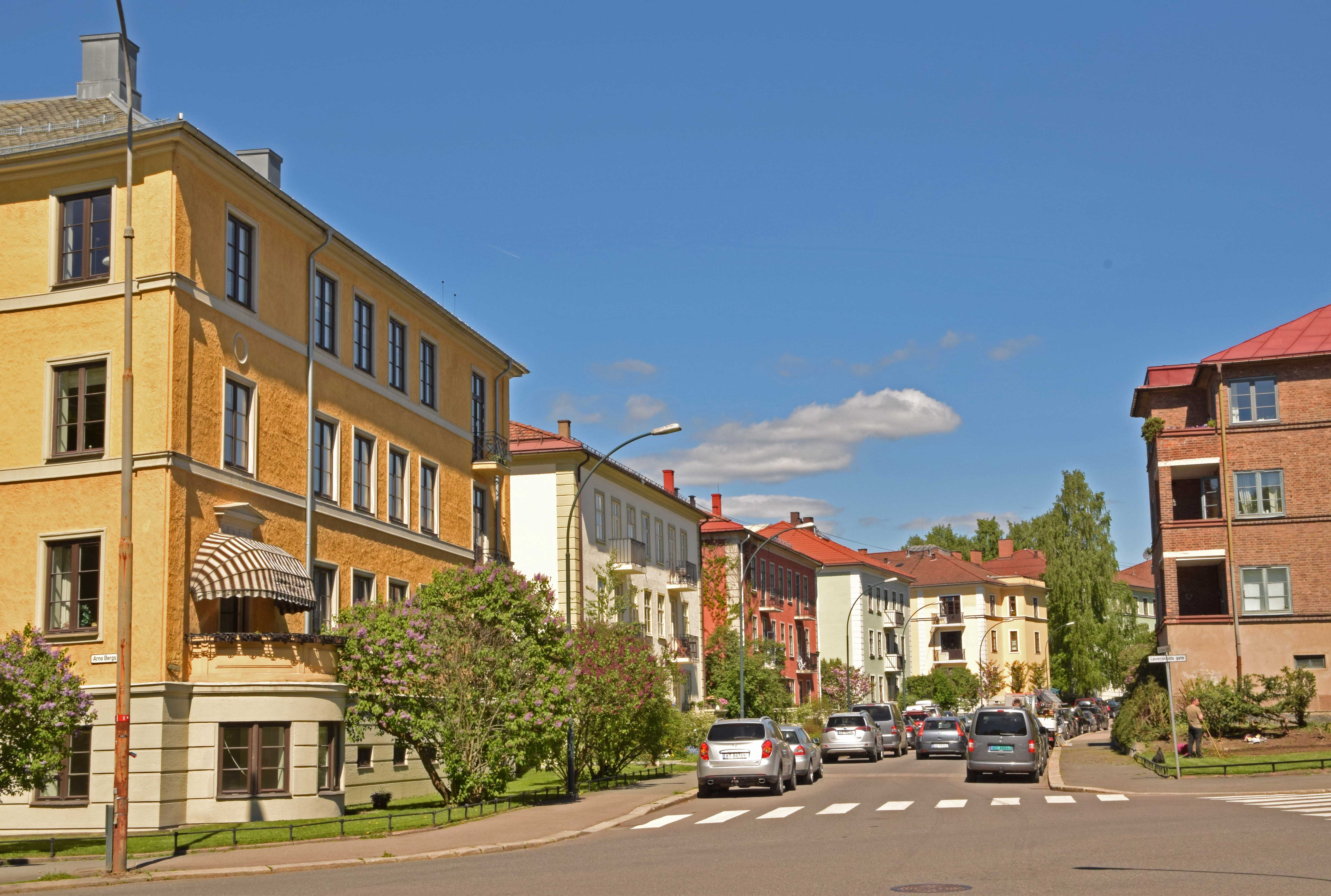 Schives gate sett fra Løvenskiolds gate, Briskeby, med bebyggelse som tilhører Langaardsløkken, bygget i 19020-årene. Gyldenløves gate 27 til venstre.